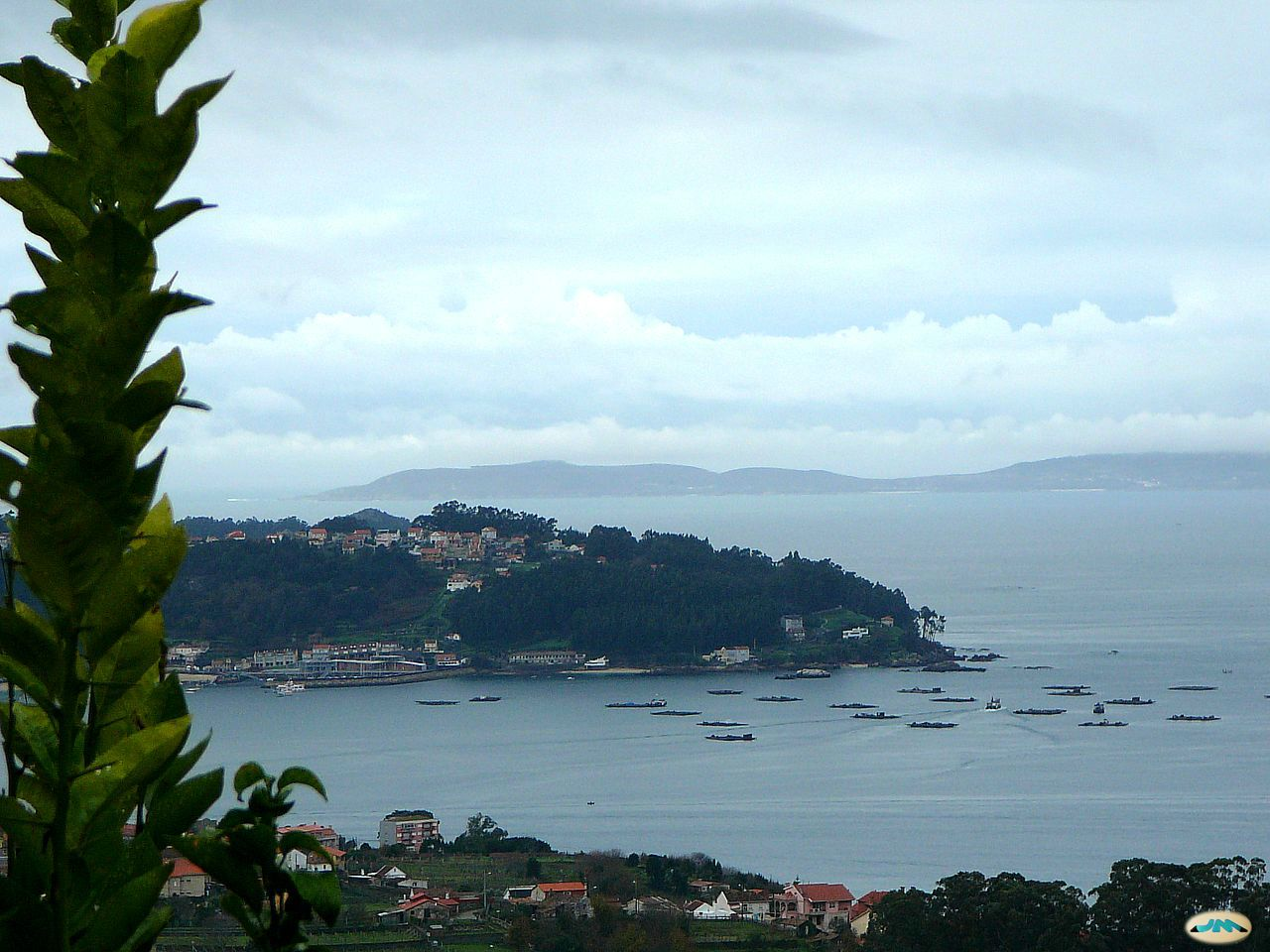 Beluso desde Cela2